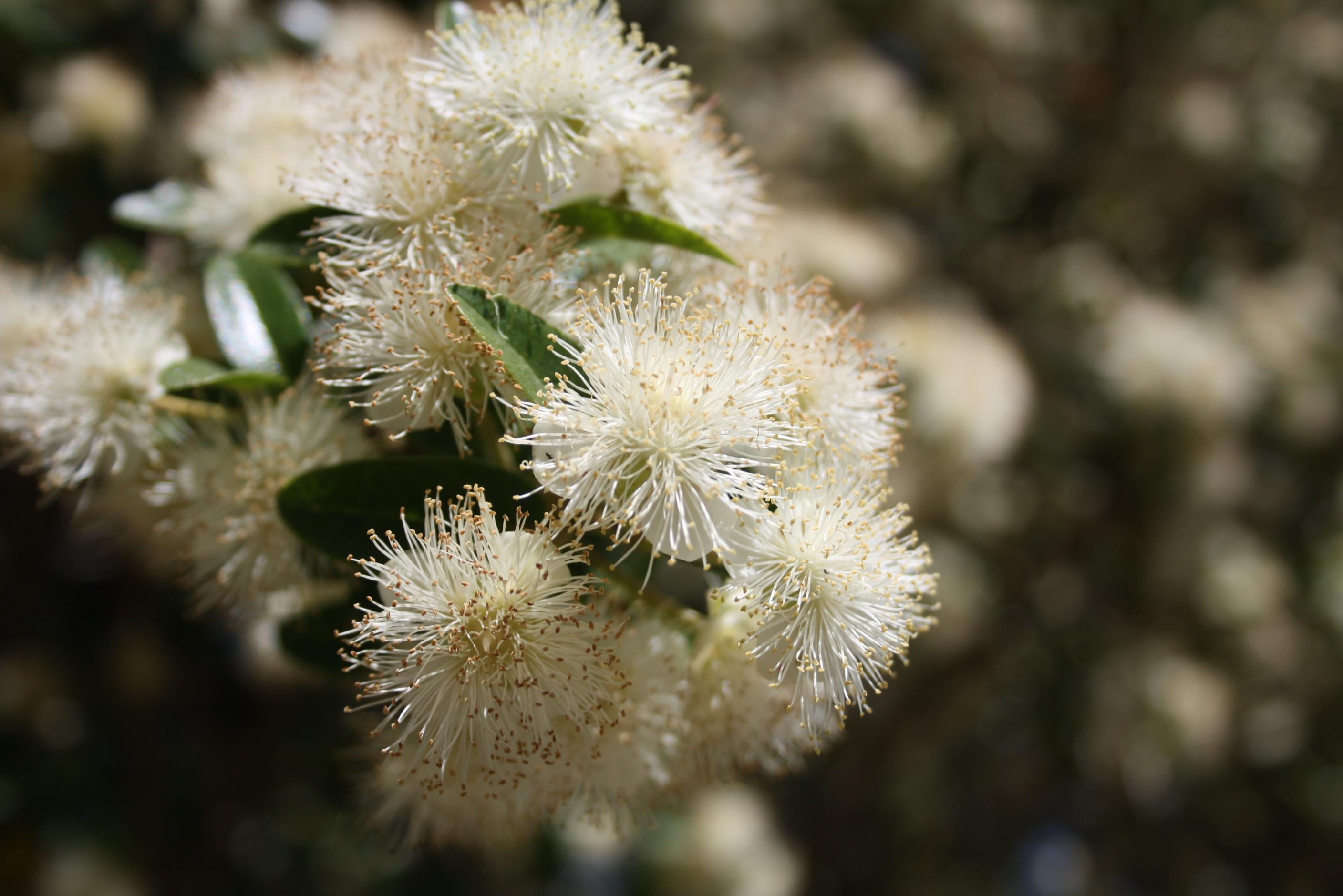 Flores de Legrandia concinna